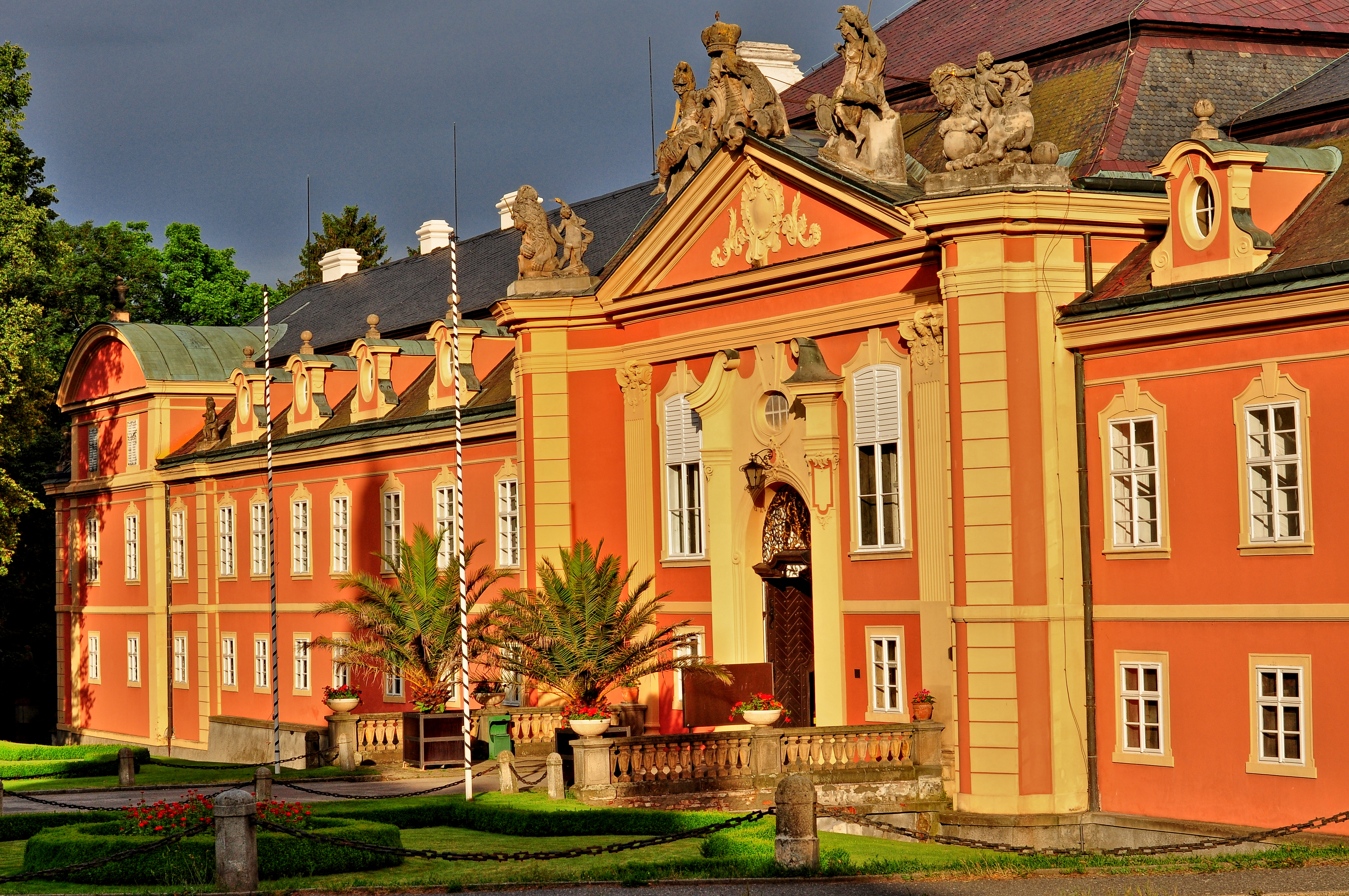 Fotografie zámku